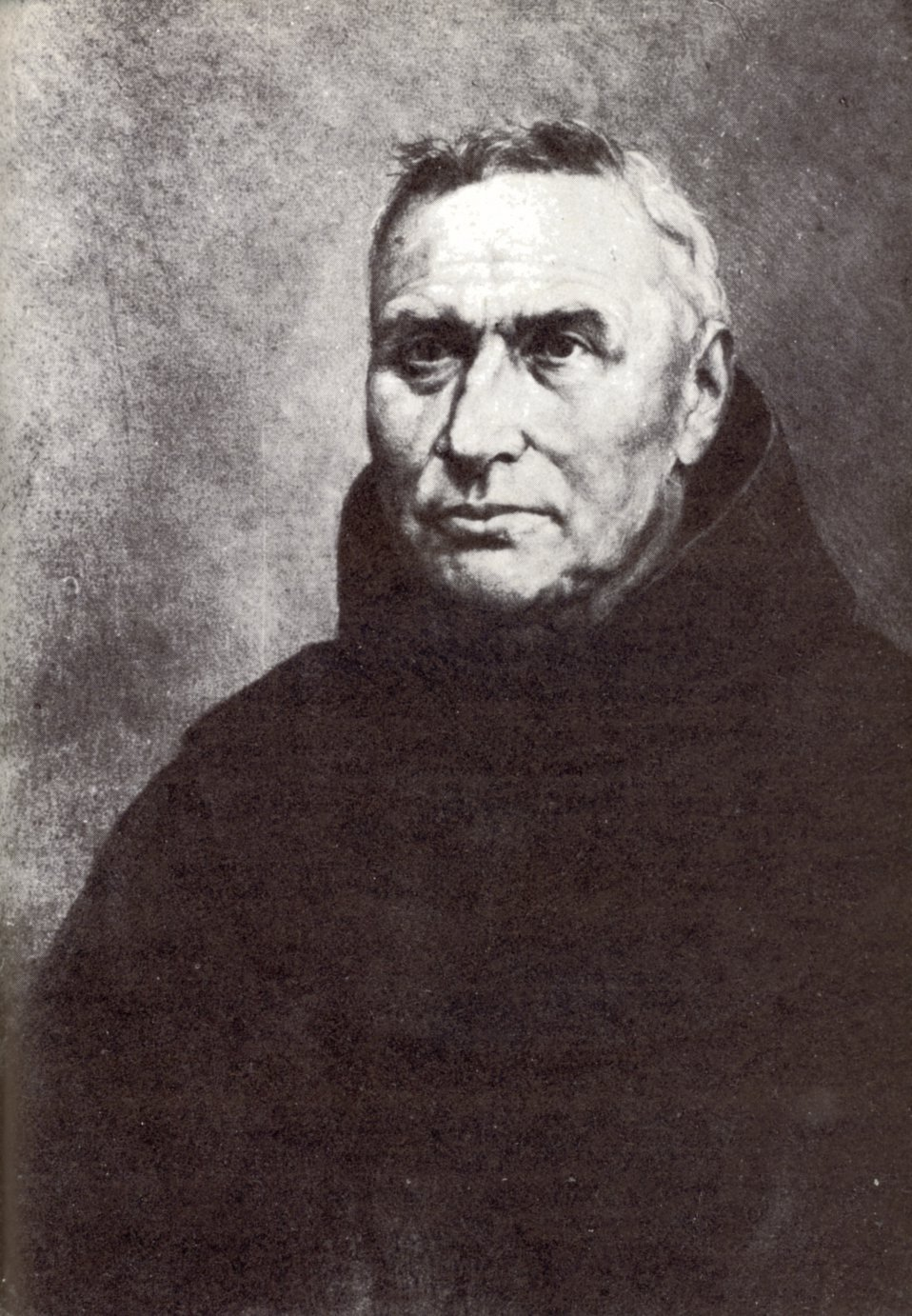 P. Justinian Ladurner (1808-1874), Zeichnung von Hans Rabensteiner, Klausen 21.3.1884